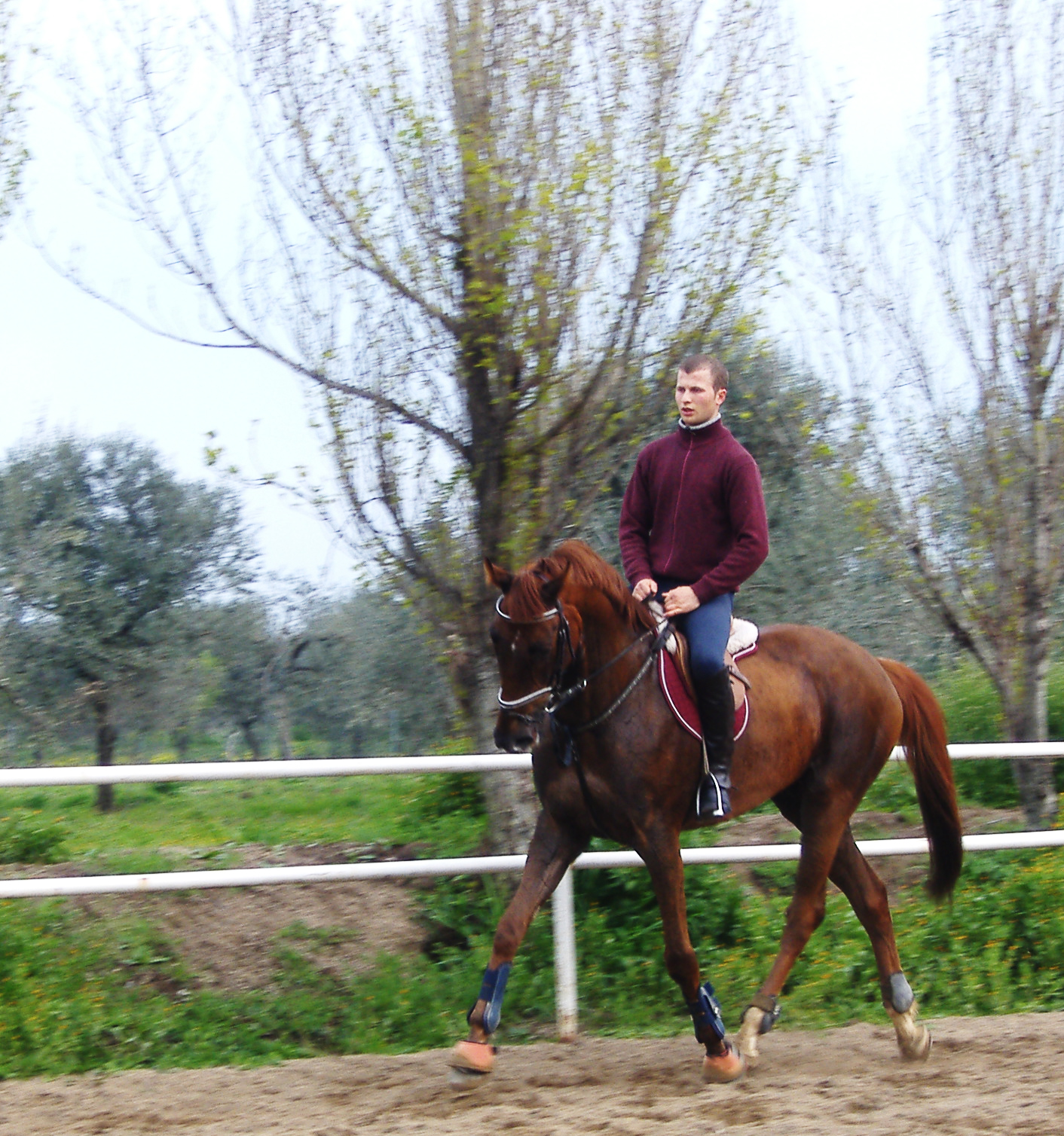 Cavallo anglo-arabo sardo - lavoro in piano